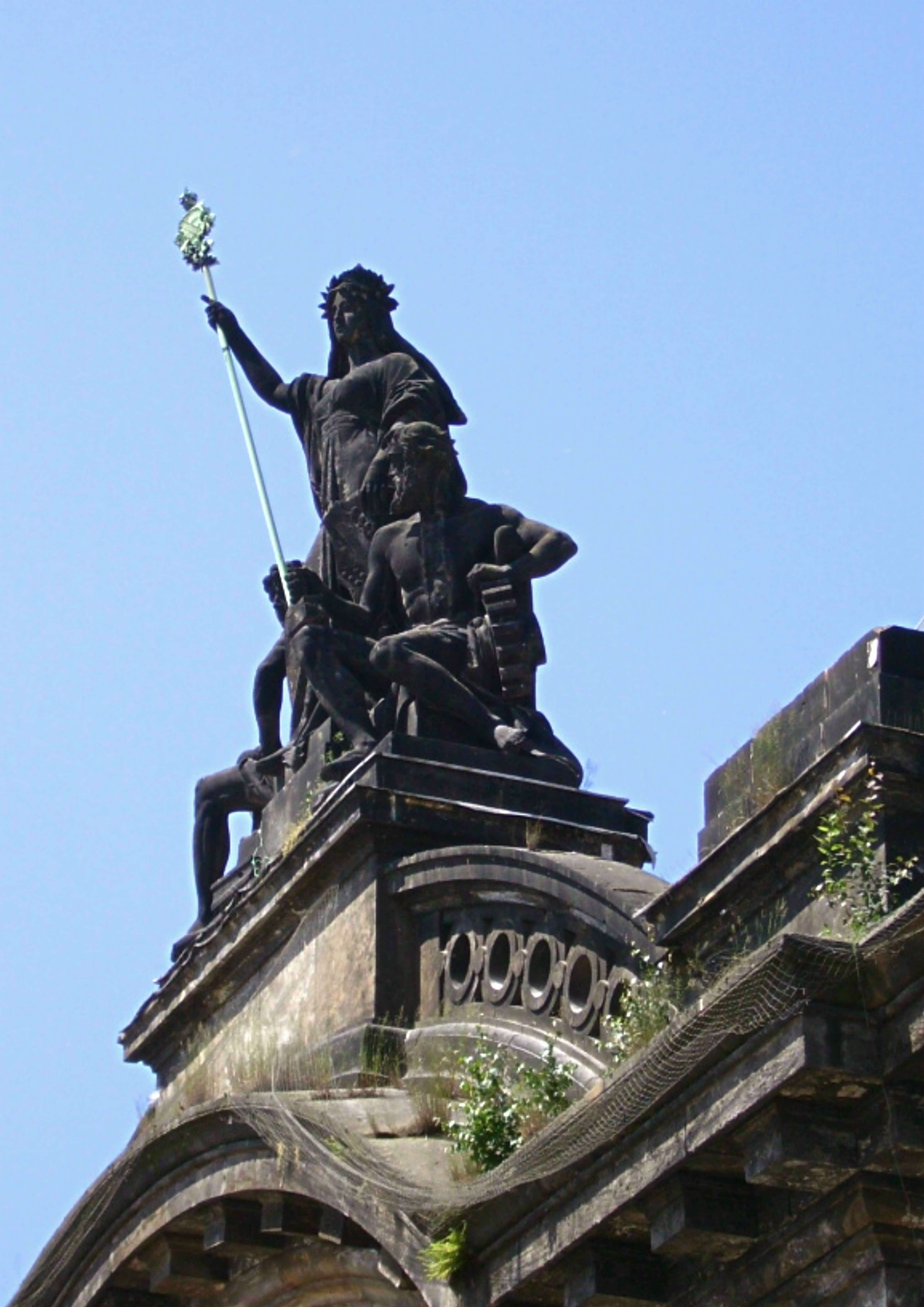 Saxonia, Skulpturengruppe vom Dresdner Bildhauer Friedrich Rentsch (1895) über dem Portal des Dresdner Hauptbahnhofs. Saxonia, als Personifikation Sachsens, mit den allegorischen Figuren Wissenschaft und Technik.